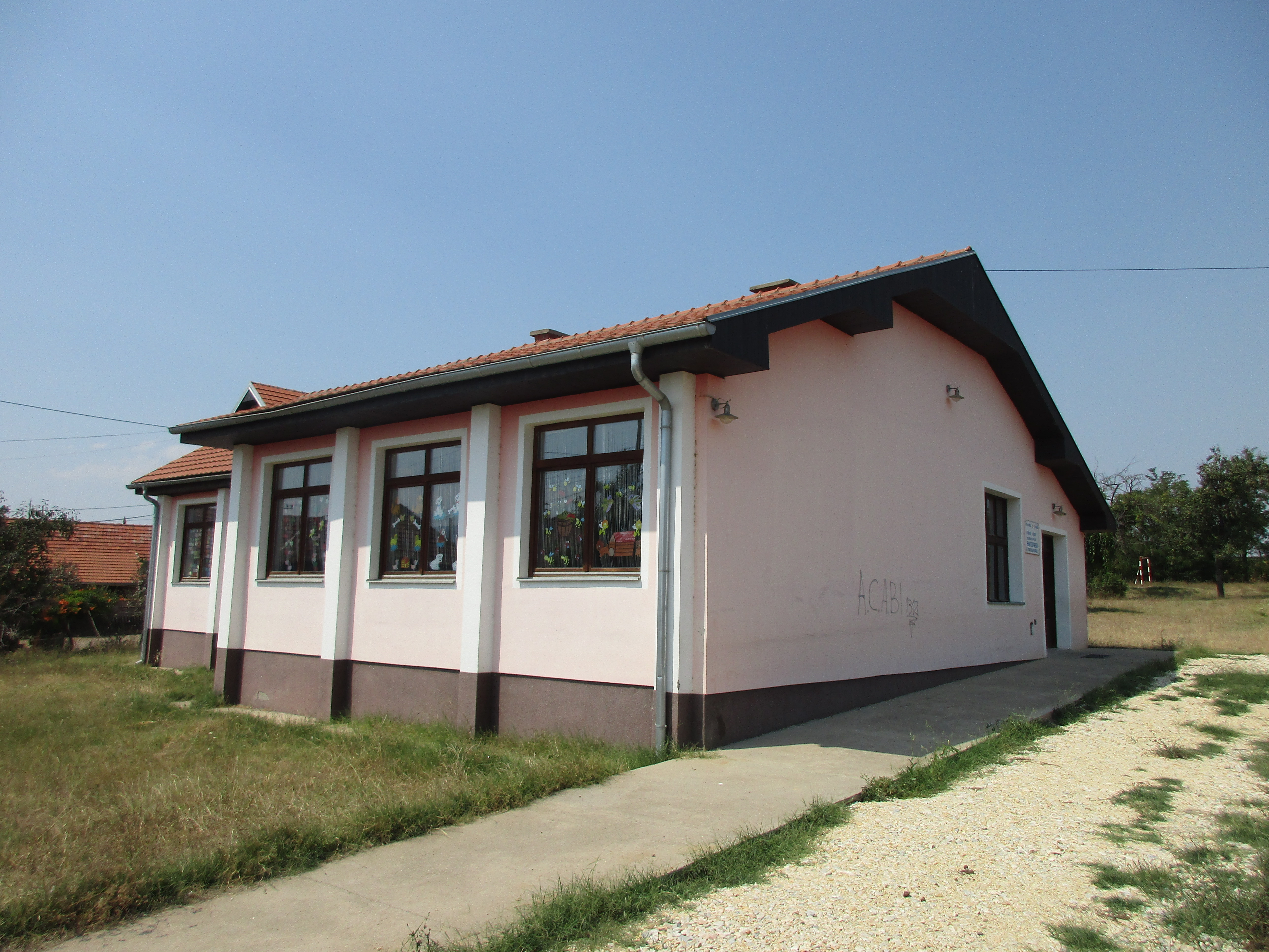 Srpski (latinica): Glašince